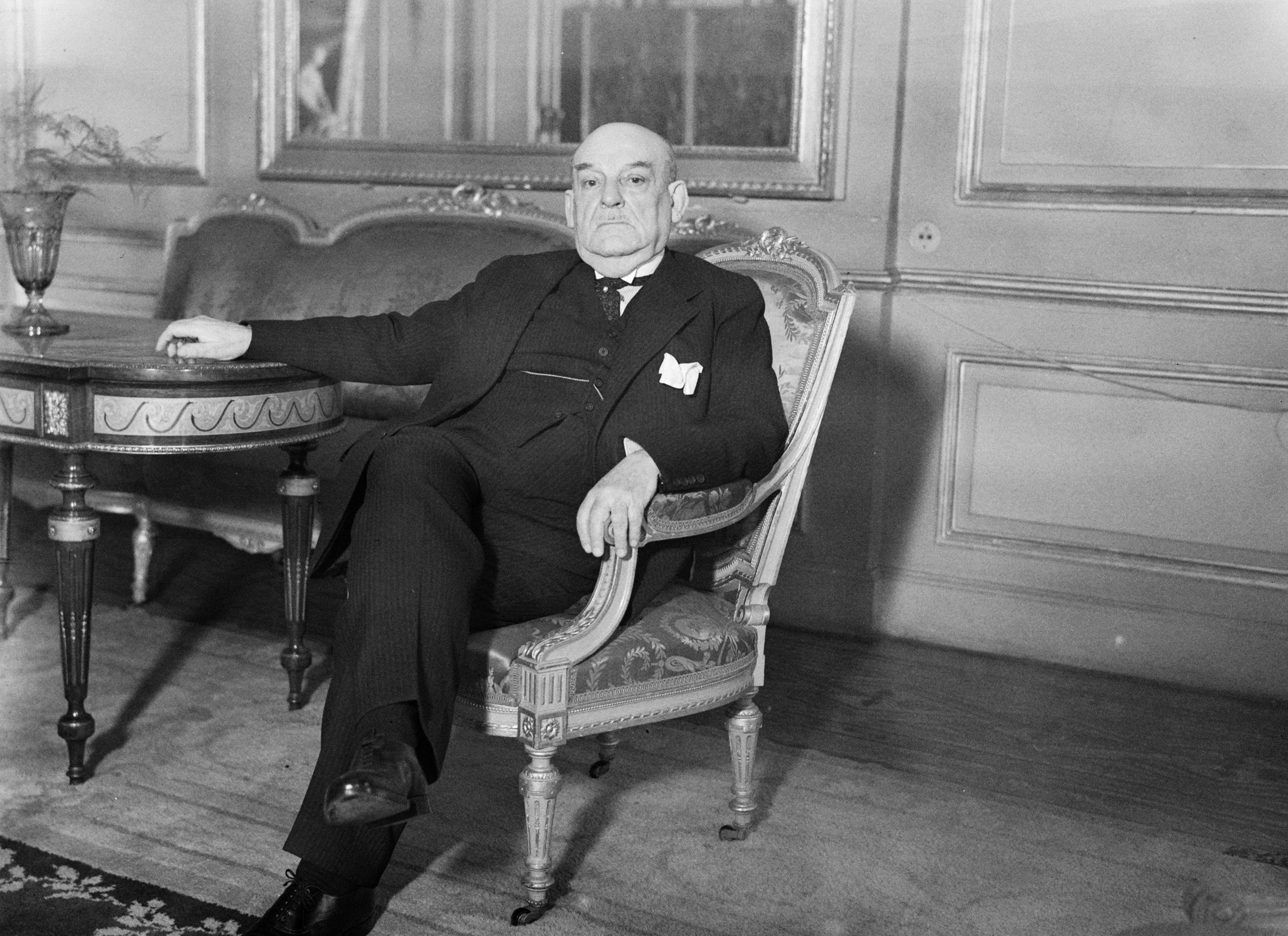 Collectie / Archief : Fotocollectie Van de Poll Reportage / Serie : [ onbekend ] Beschrijving : Een Belgische minister, waarschijnlijk Emile Francqui (1963-1935), minister van Staat Datum : 1935 Locatie : Brussel Persoonsnaam : Francqui, Emile Fotograaf : Poll, Willem van de Auteursrechthebbende : Nationaal Archief Materiaalsoort : Negatief (zwart/wit) Nummer archiefinventaris : bekijk toegang 2.24.14.02 Bestanddeelnummer : 255-8609